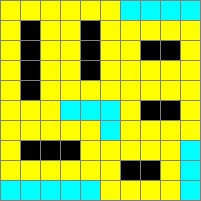 Malbona meto de ŝipoj en la ludo marbatalo